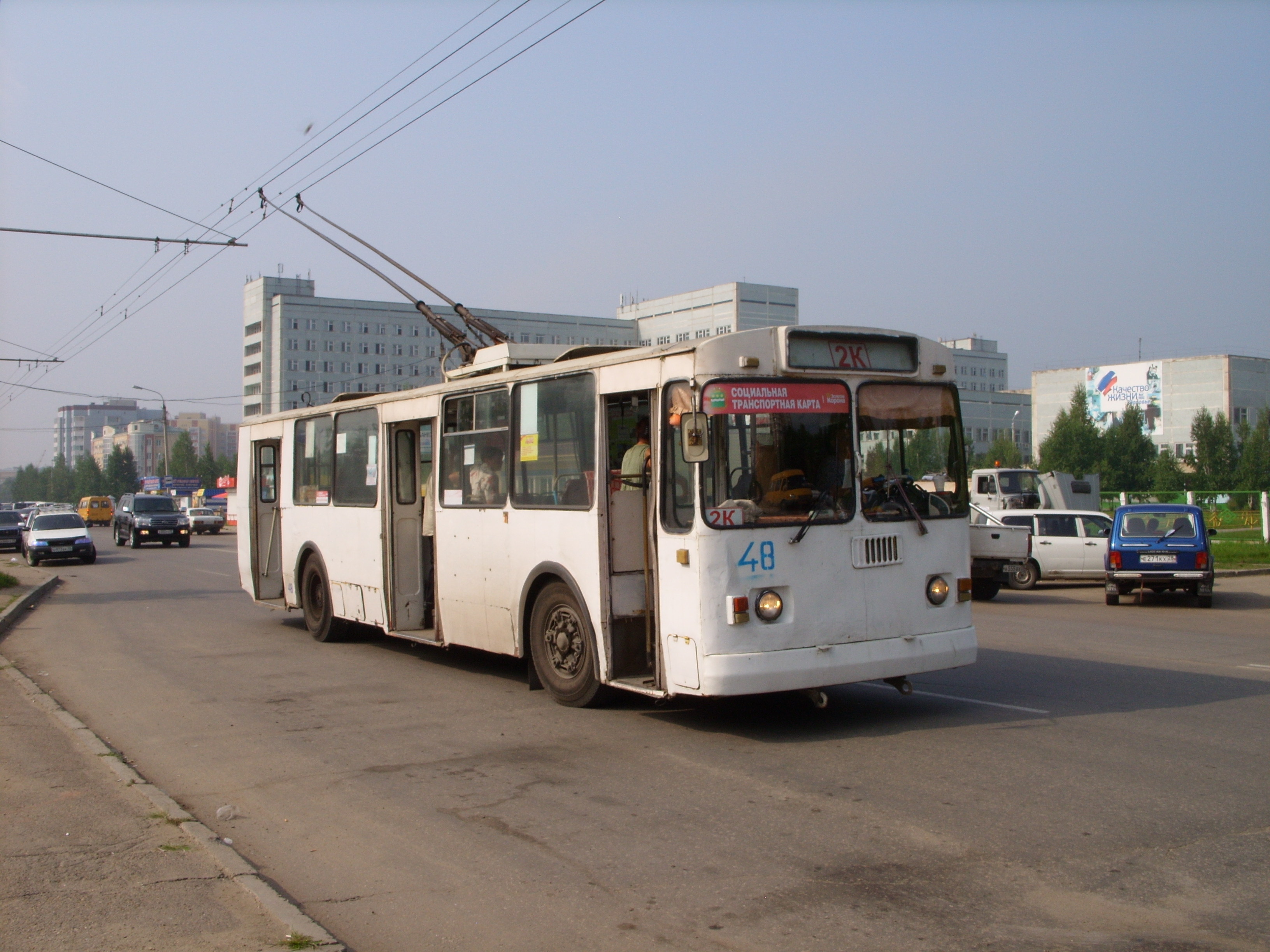 снимки августа 2011 г.